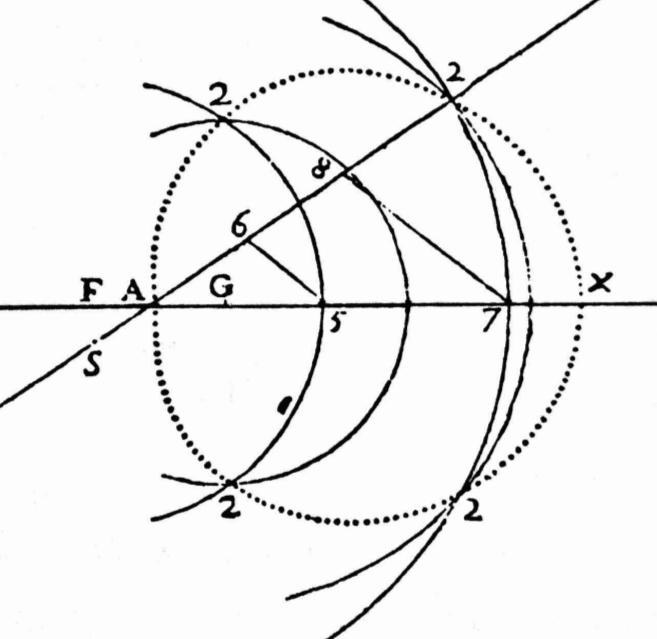 Oval de segona classe a la Geometria de Descartes